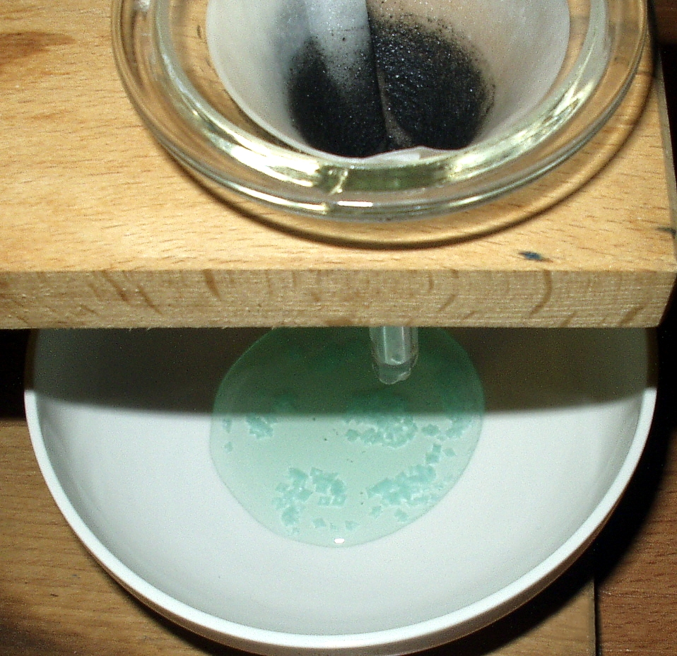 Eisen(II)-sulfat kristallisiert unmittelbar nach dem Abfiltrieren in hellgrünen Kristallen aus.